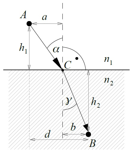 Valguskiire murdumine keskonda